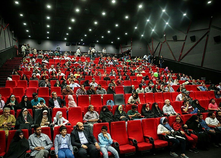 پردیس سینمایی کوروش - ۱۳۹۵